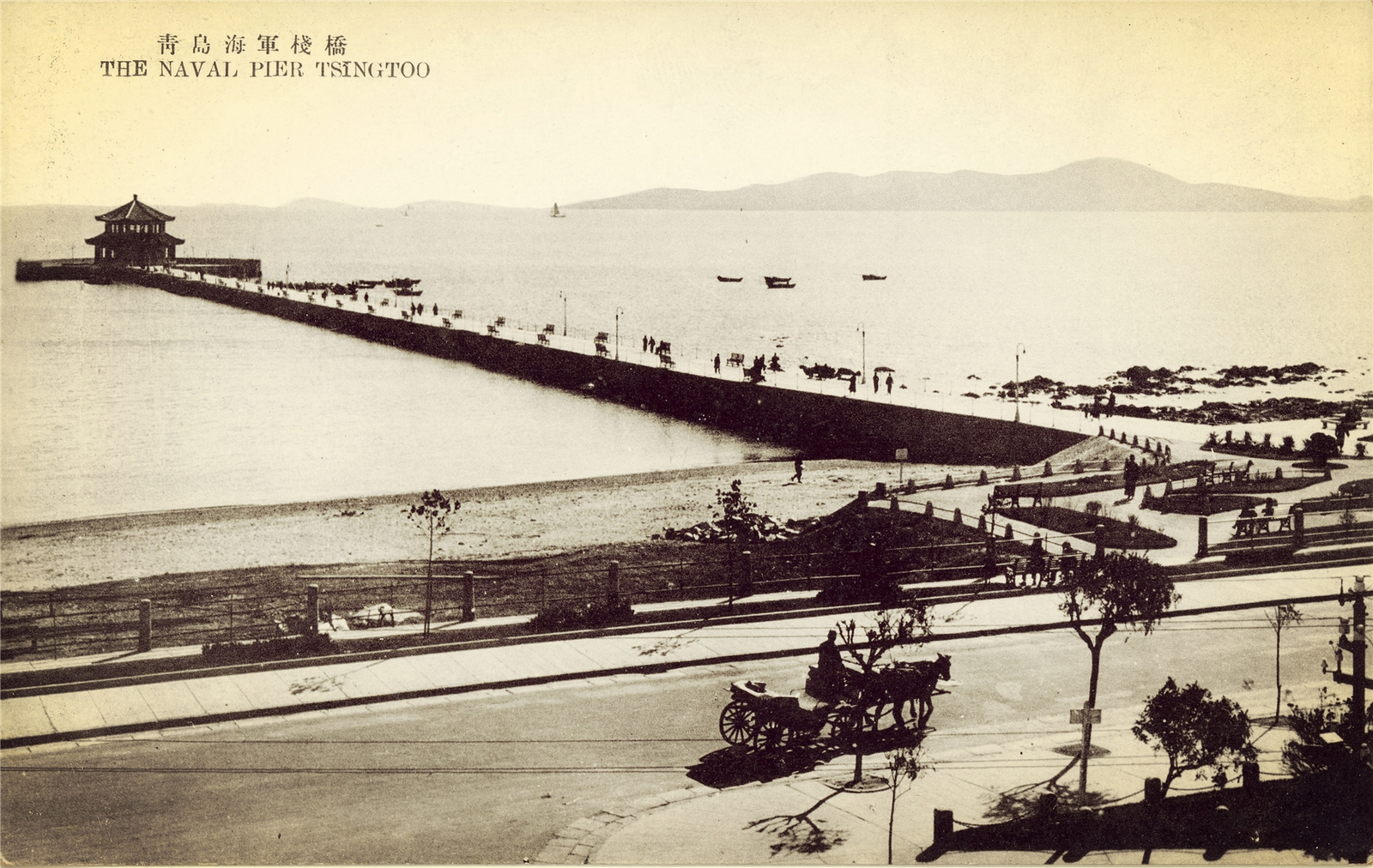 青岛栈桥三十年代